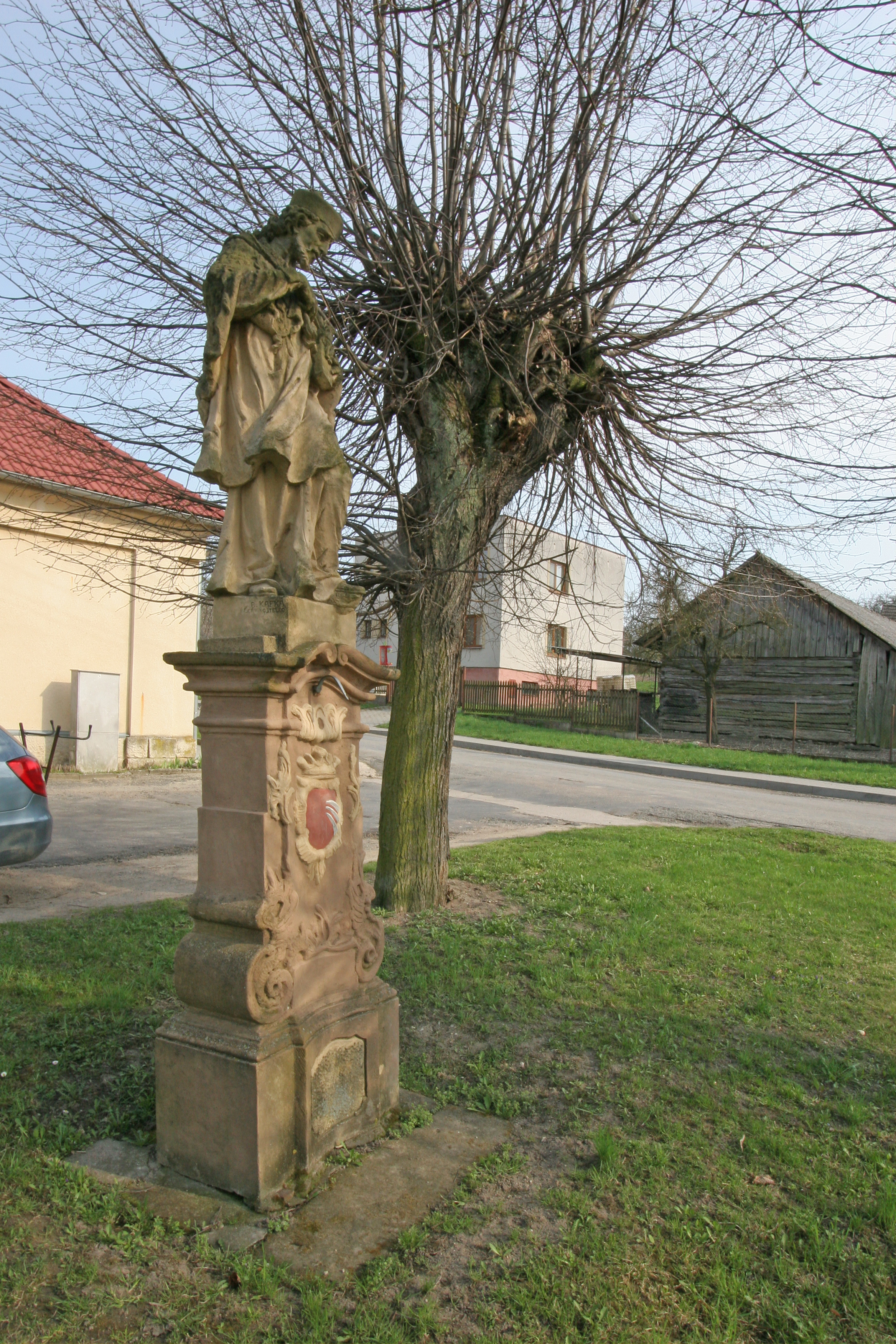 Vápno sv. Jan Nepomucký